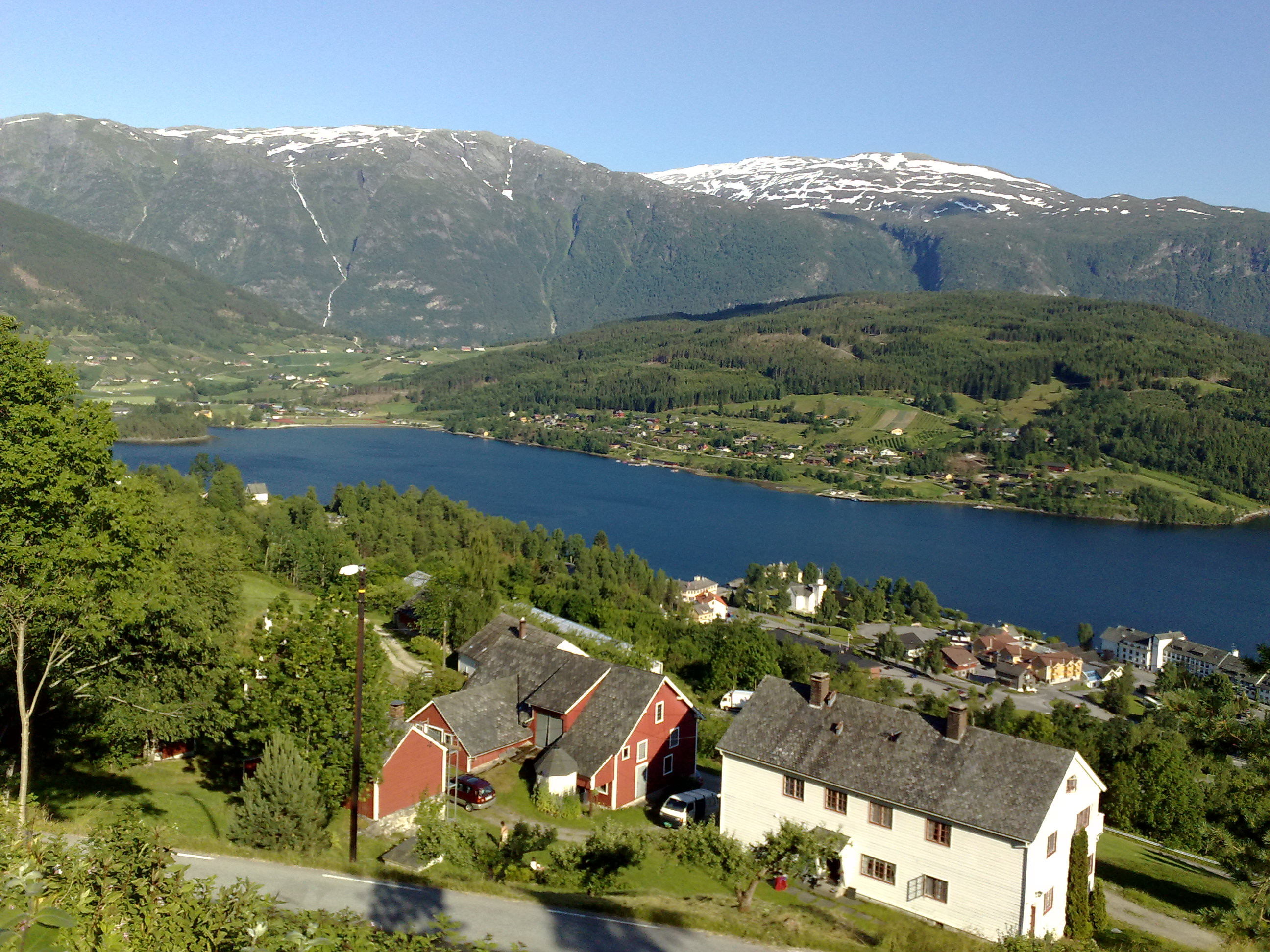 Ulvik med tilliggande herligheiter II